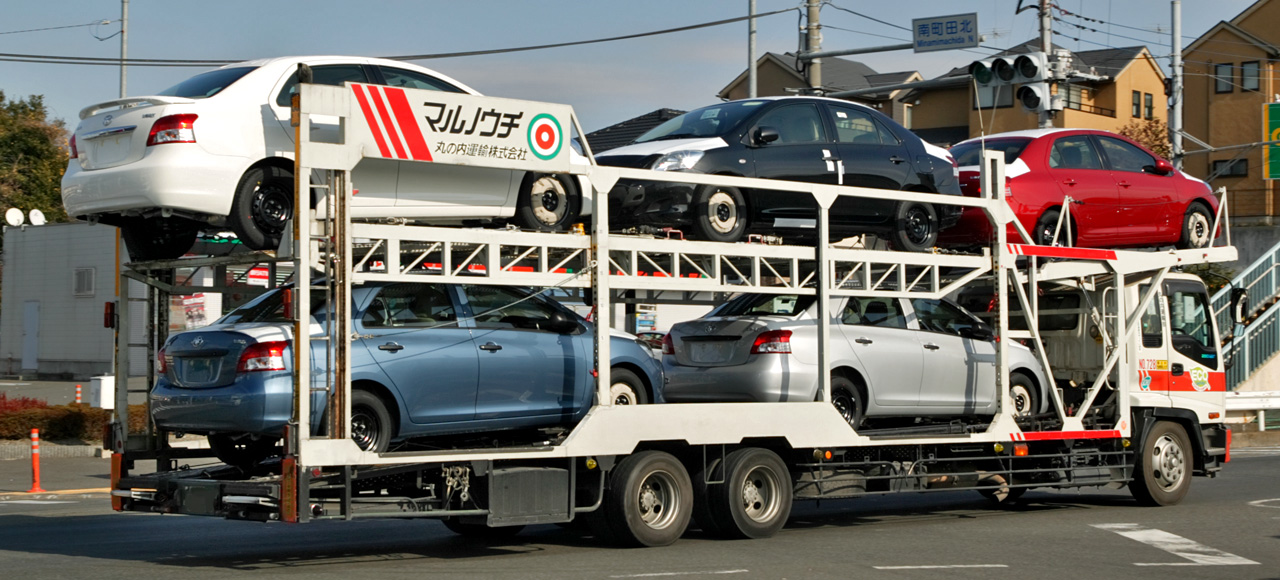 Car transporter